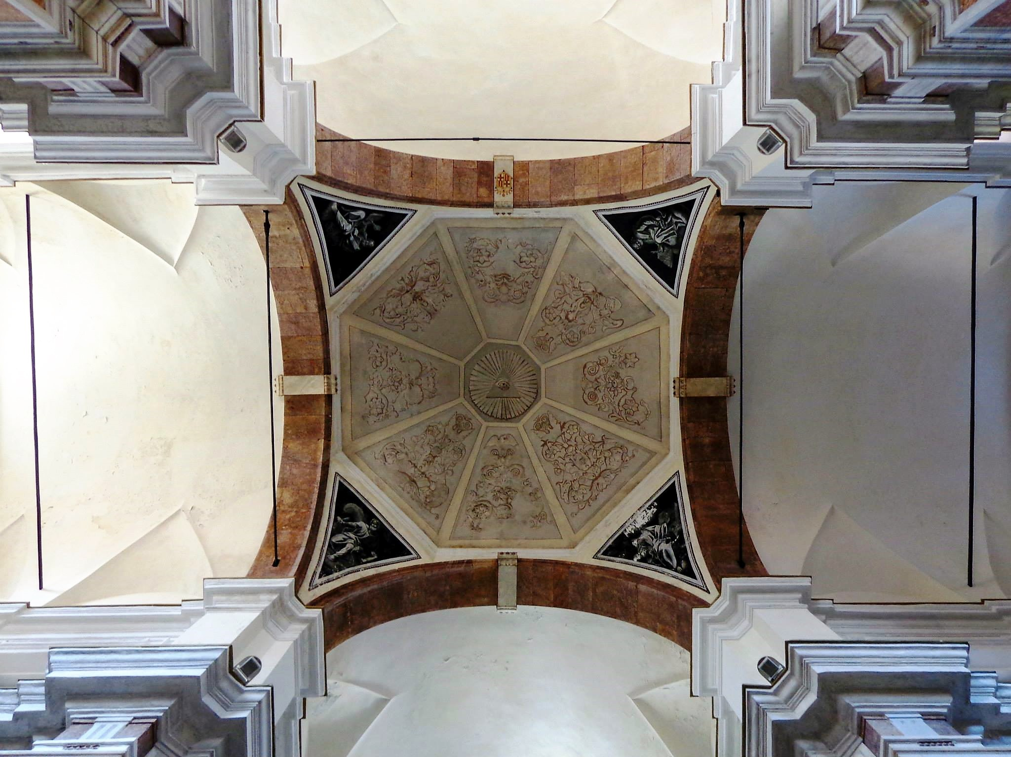 Crociera chiesa di Sant'Eulalia dei Catalani. Foto presente sulla pagina personale di Facebook caricata il 3 novembre 2014.